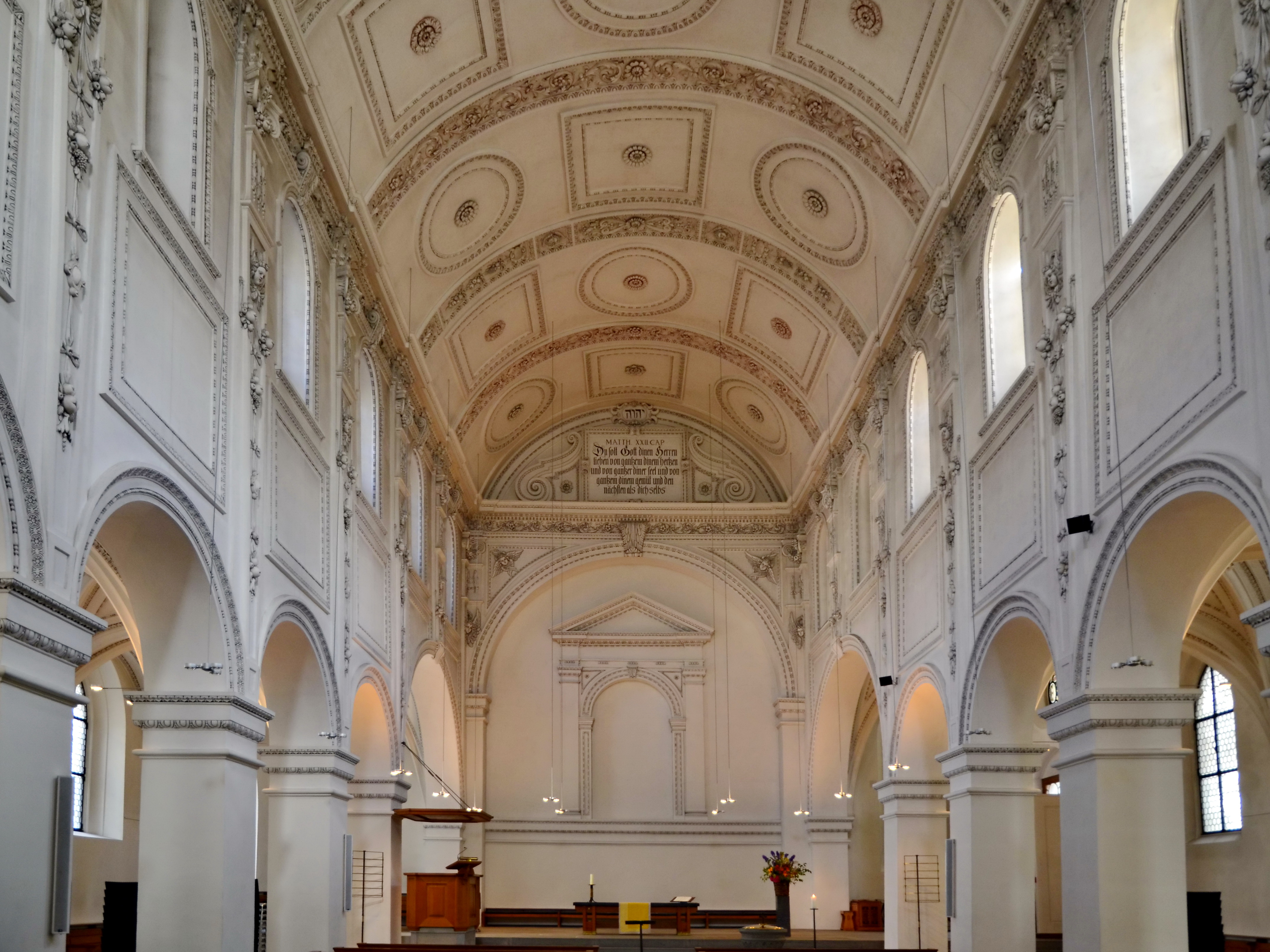 Predigerkirche